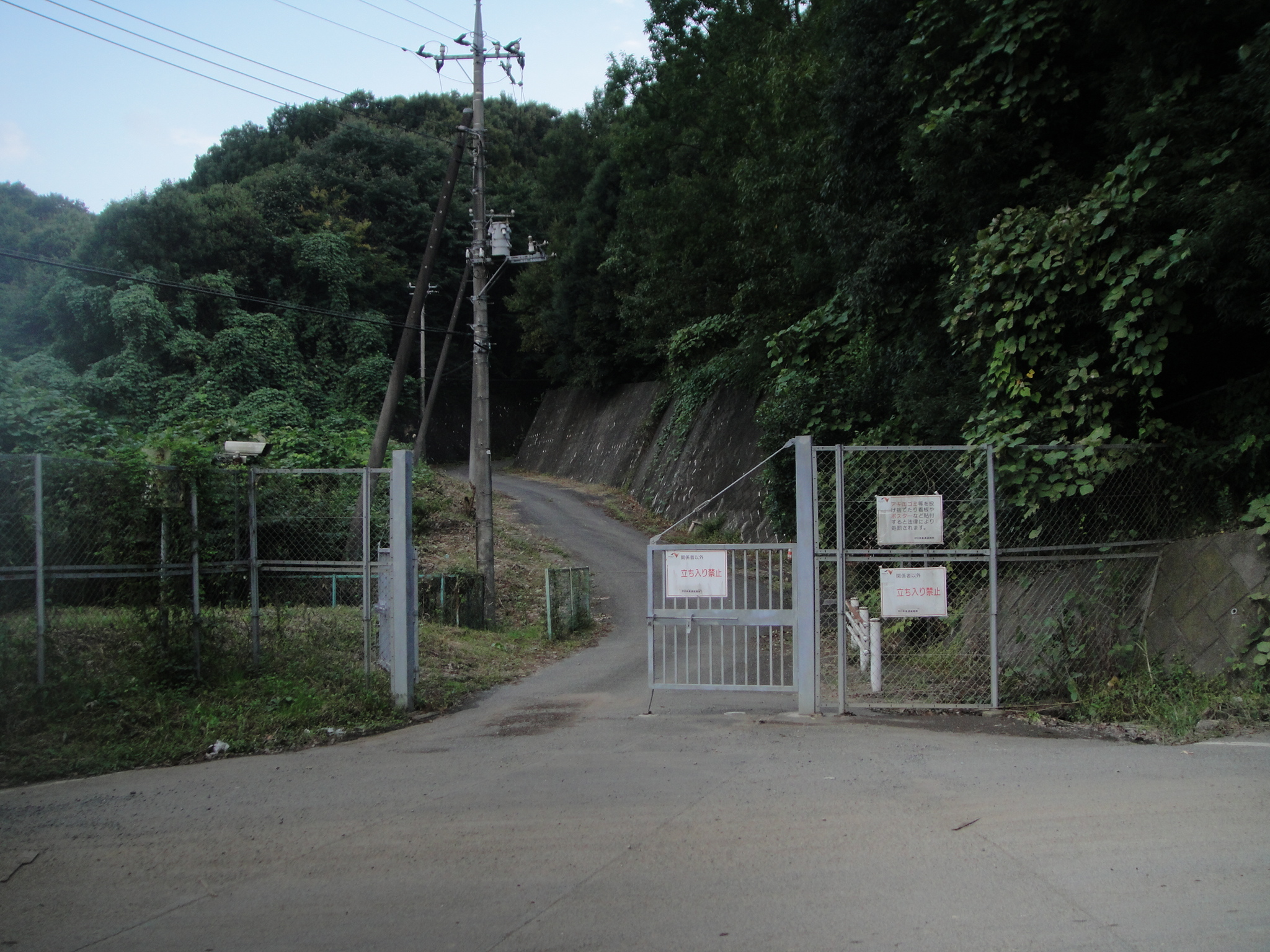 Titleと同じ